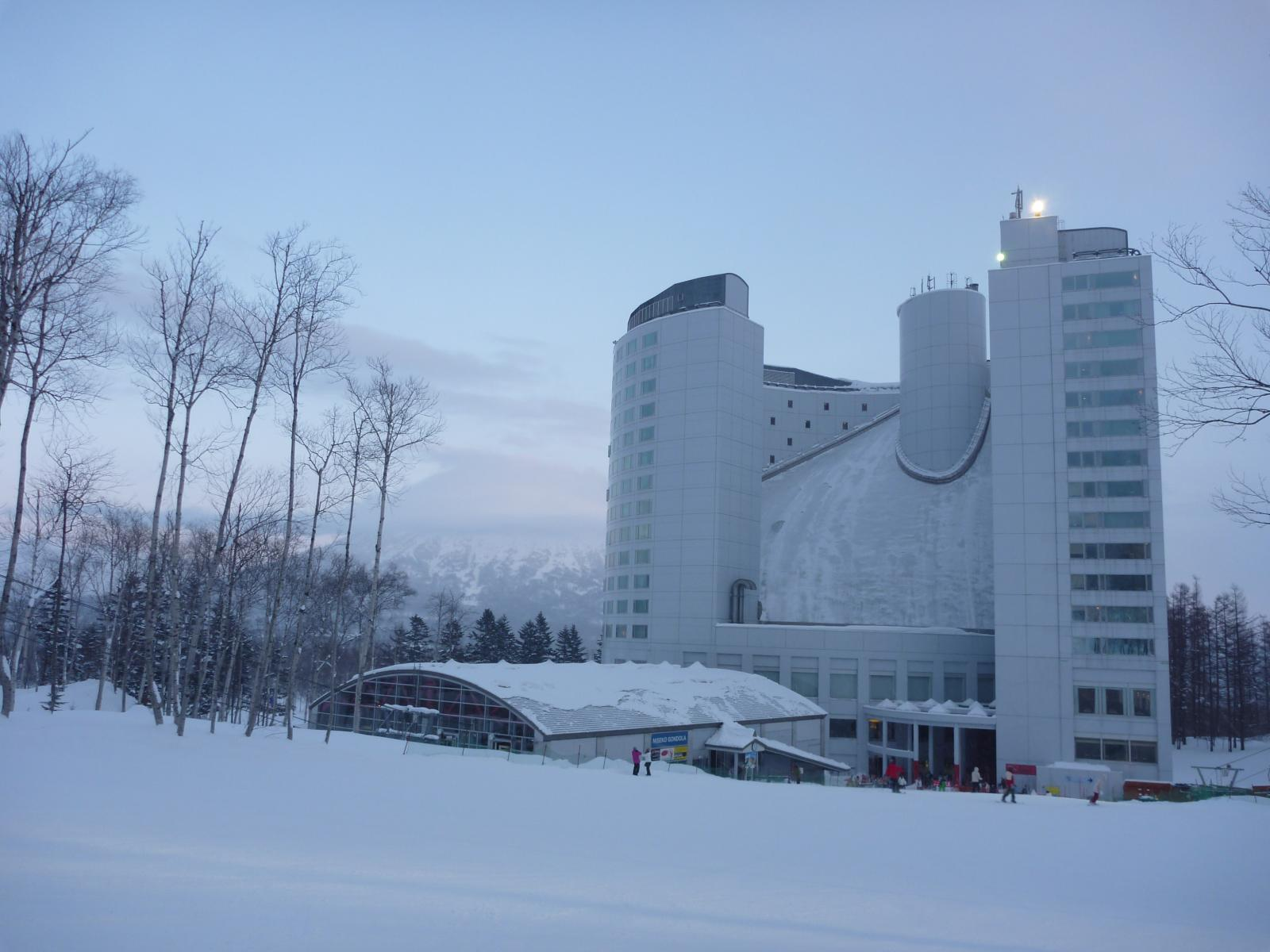 ヒルトン ニセコ